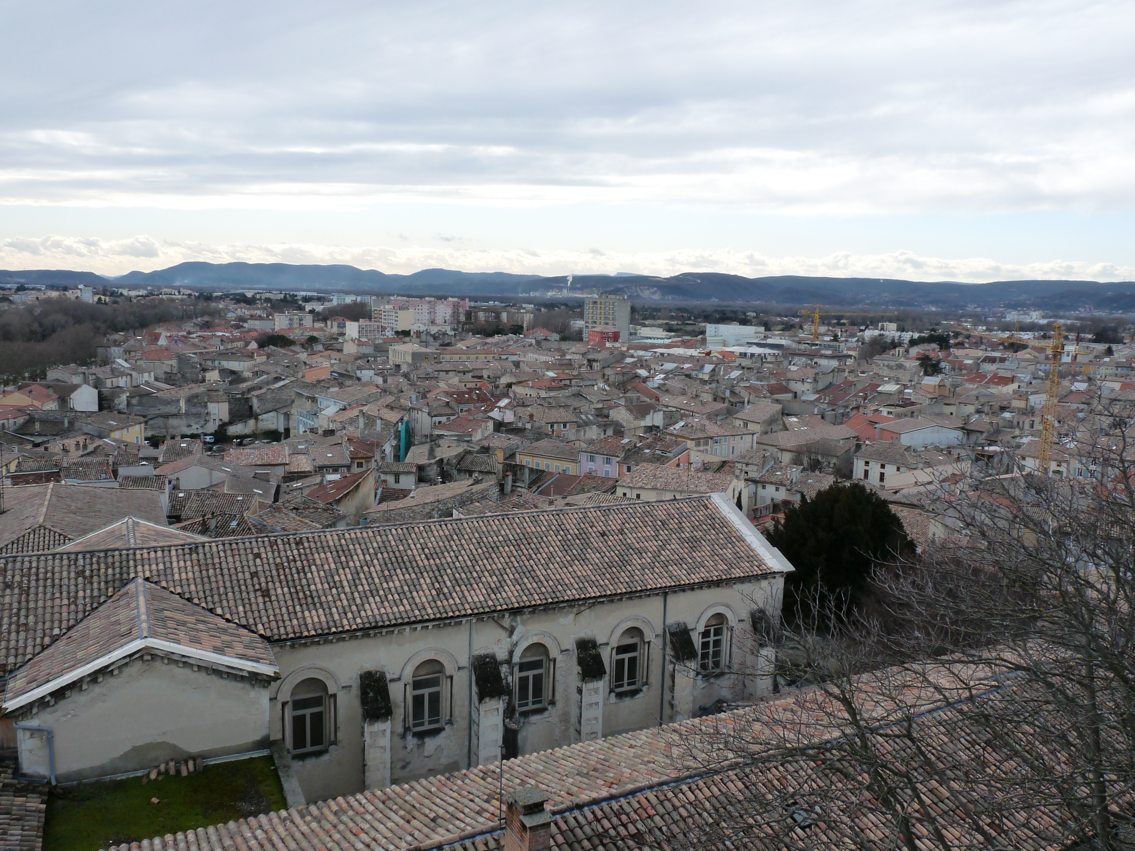 Montélimar, vue du rempart du château des Adhémar vers le sud ouest